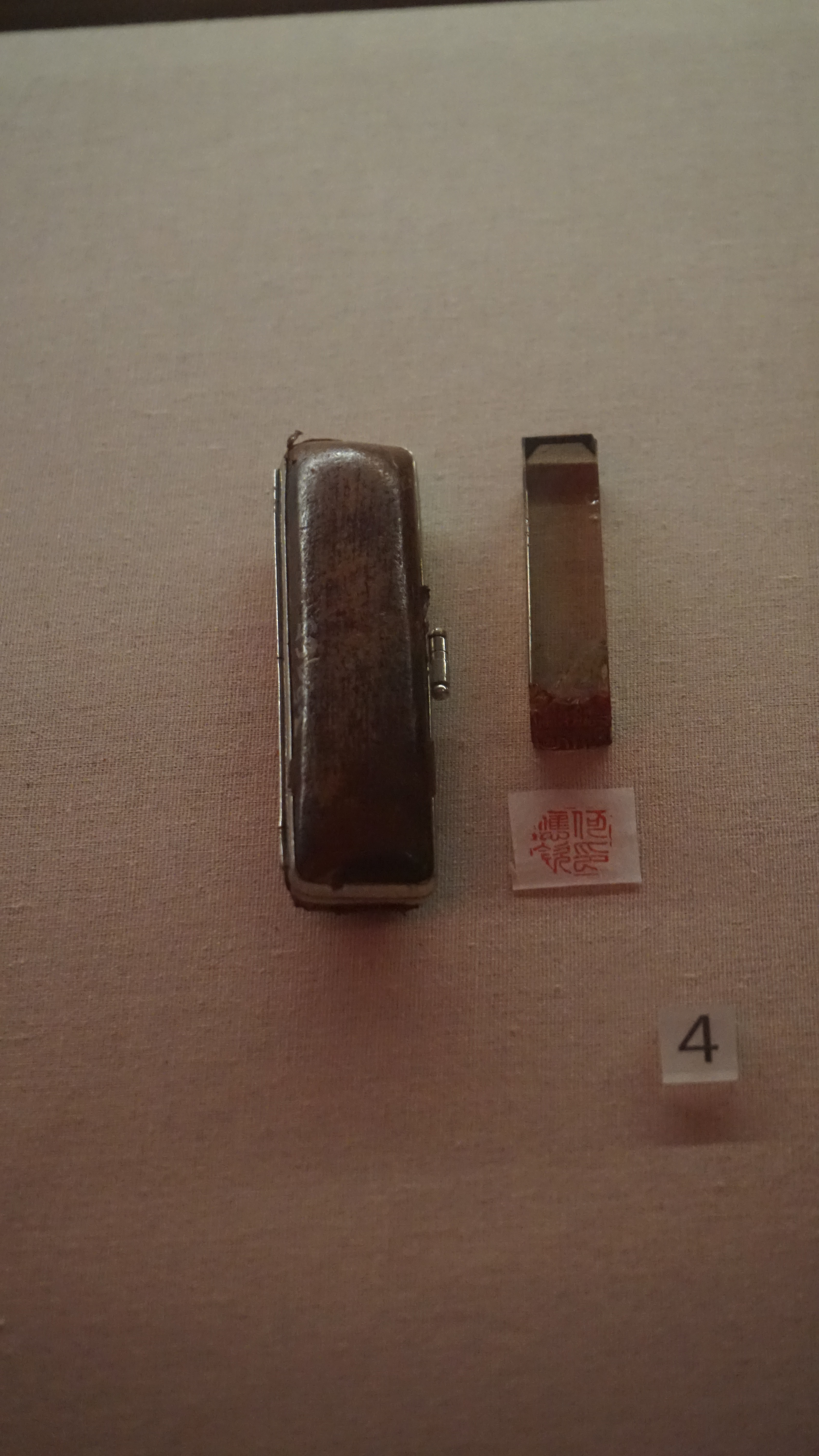 解放南京时缴获的何应钦印章。一级文物。